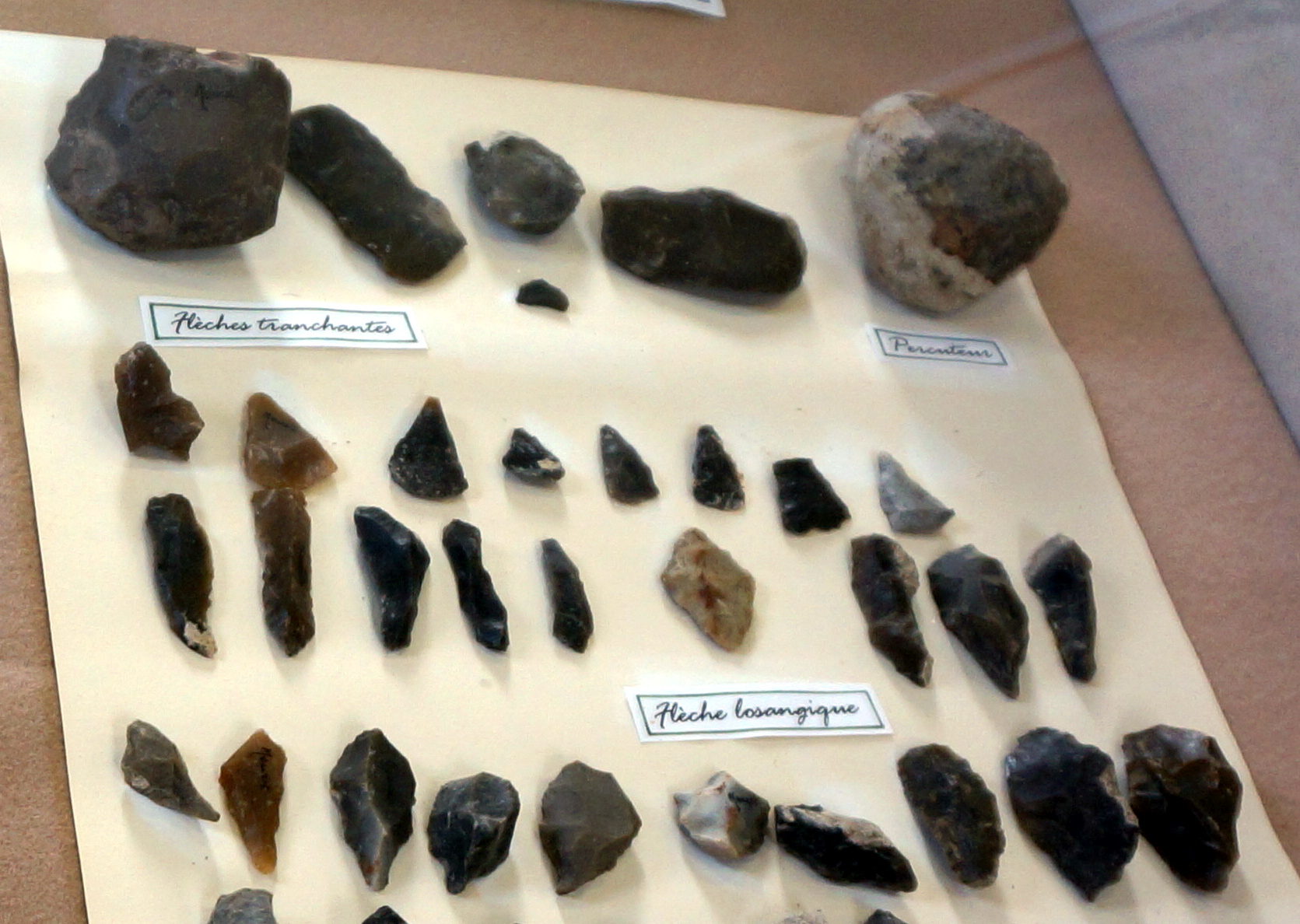 présenté au musée de Pons.